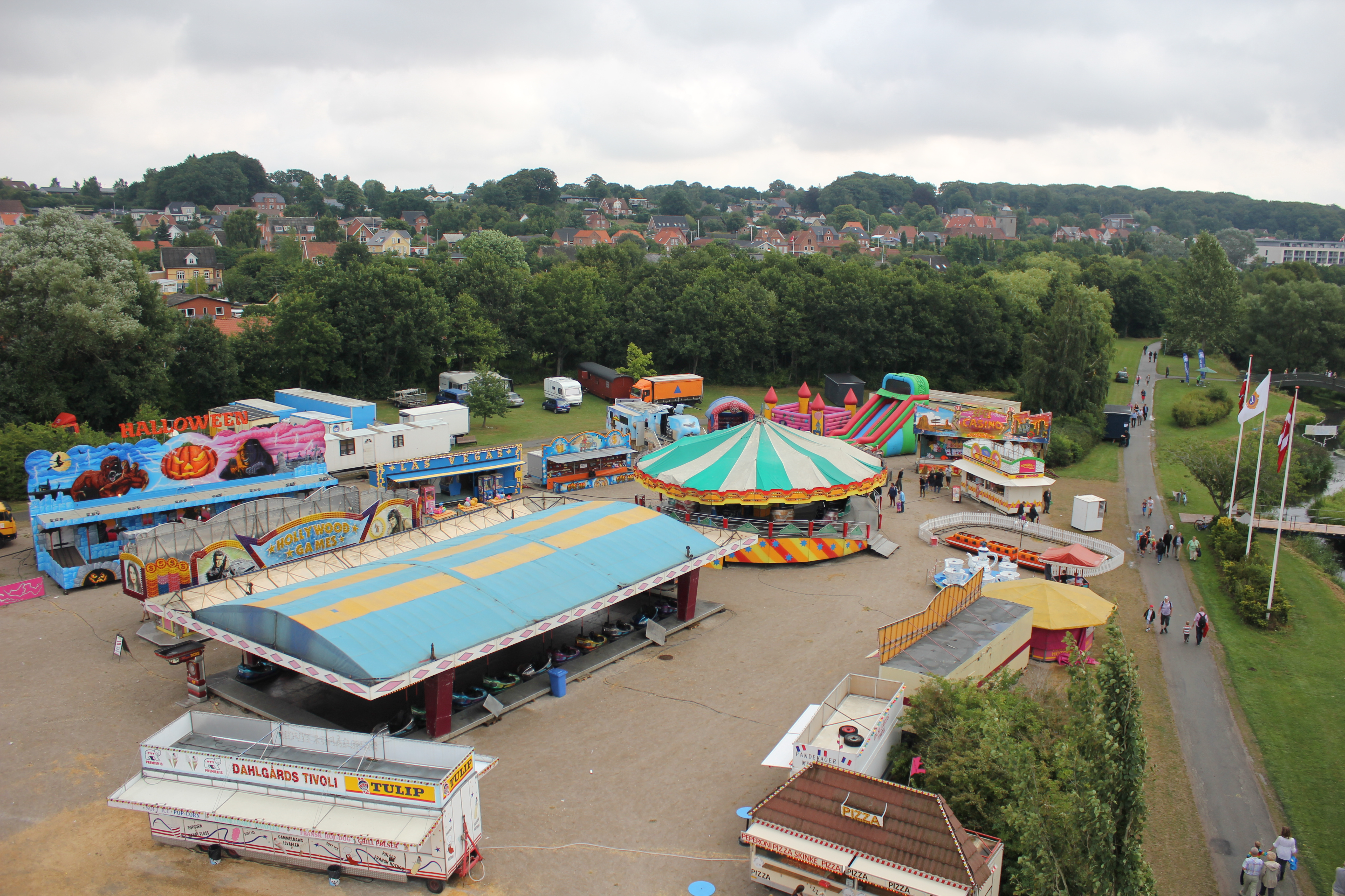 Lilleåmarked i Hadsten 2013. Set fra en kran.